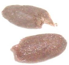 Megachile sp. Kokon miesierki